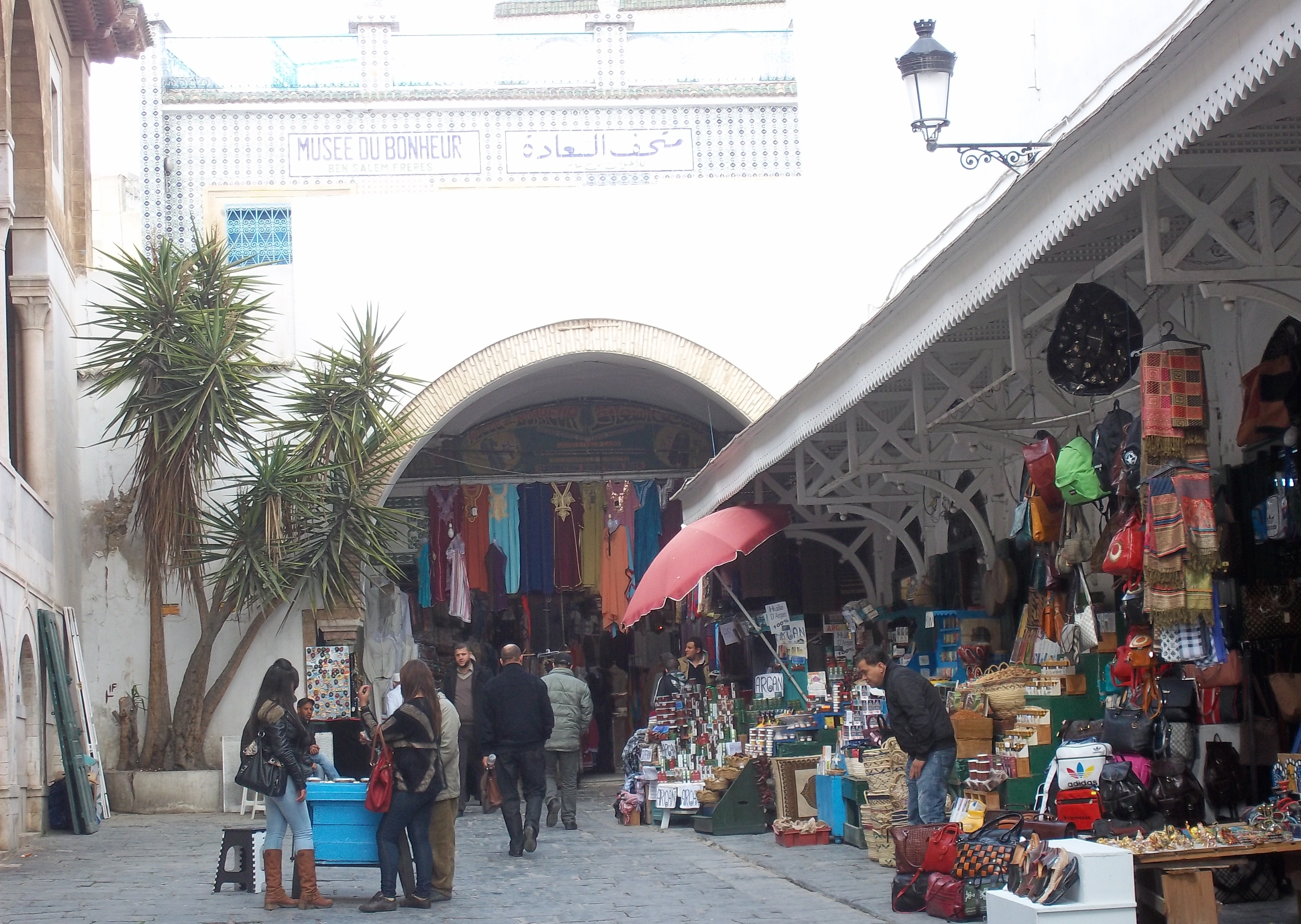 Souk à Tunis (Tunisie)